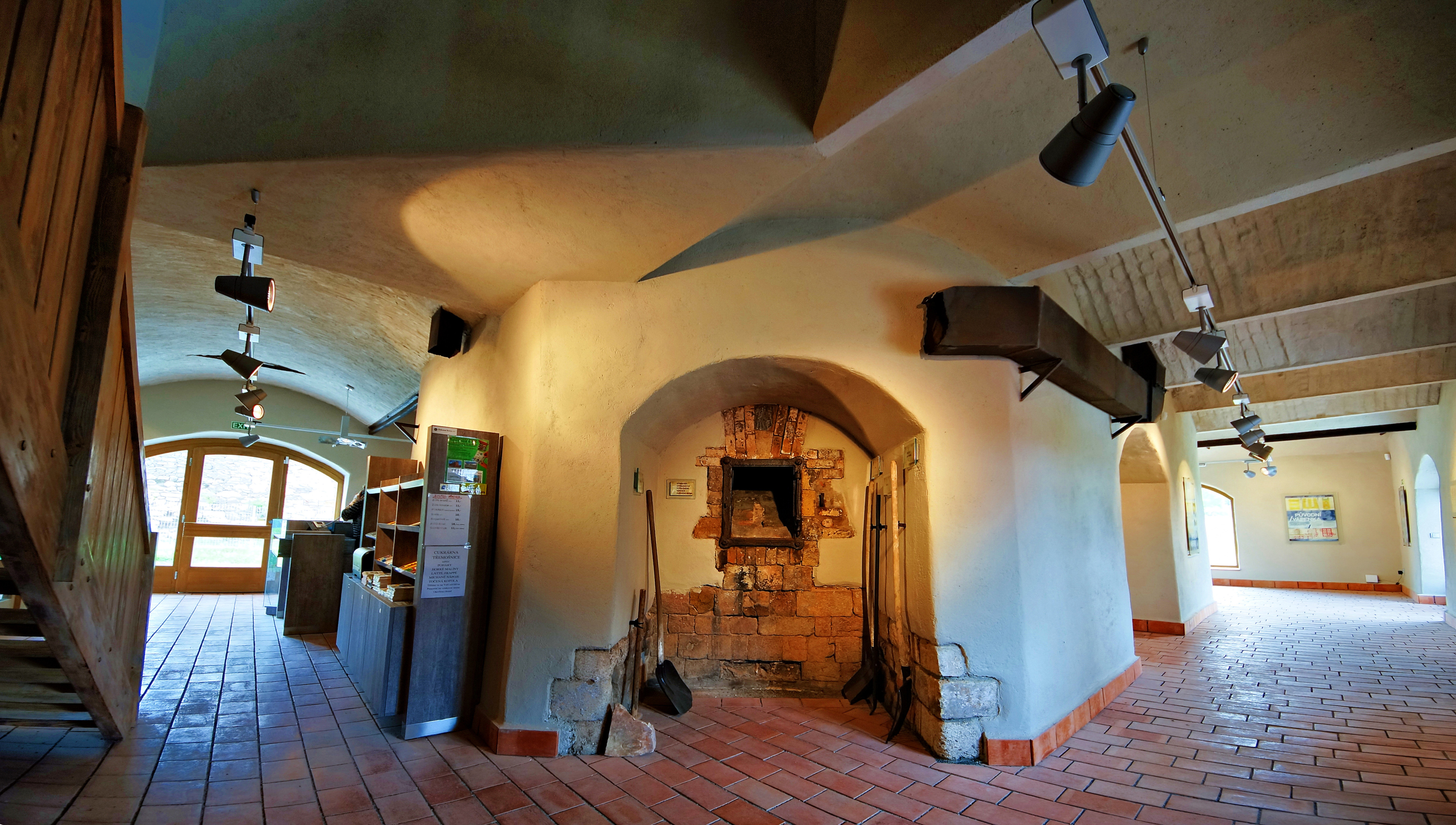 Vápenka Berlova (Třemošnice), Třemošnice.